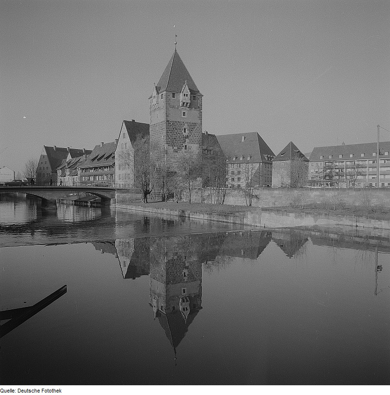 Original image description from the Deutsche Fotothek Nürnberg. Blick über die Pegnitz zum Schuldturm (sog. "Männereisen") 1320-1325